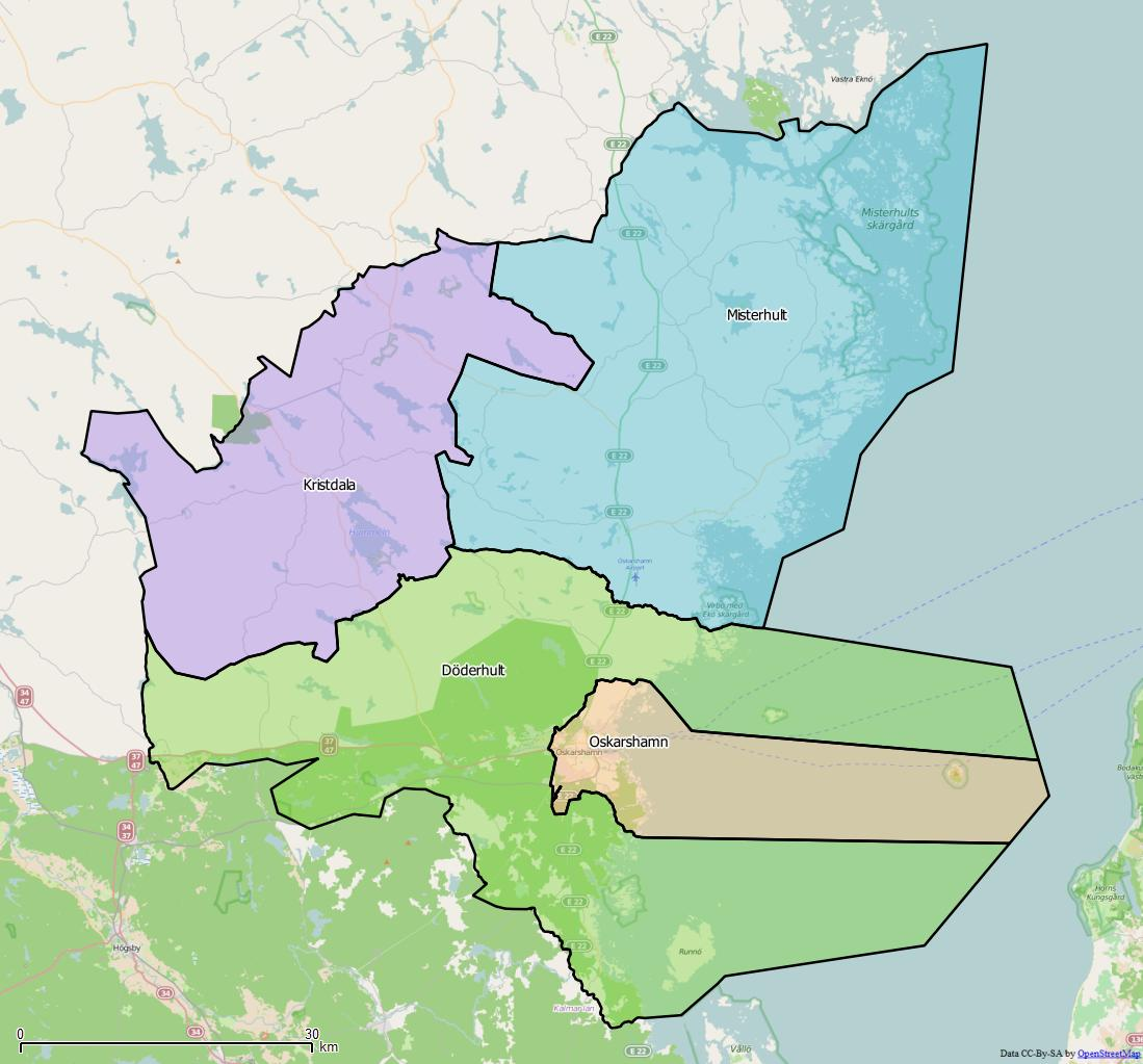 Distriktsindelningen i Oskarshamns kommun World file: 107.12253690196359912 0 0 -107.12253690196359912 1770982.30086810211651027 7891507.32843052409589291